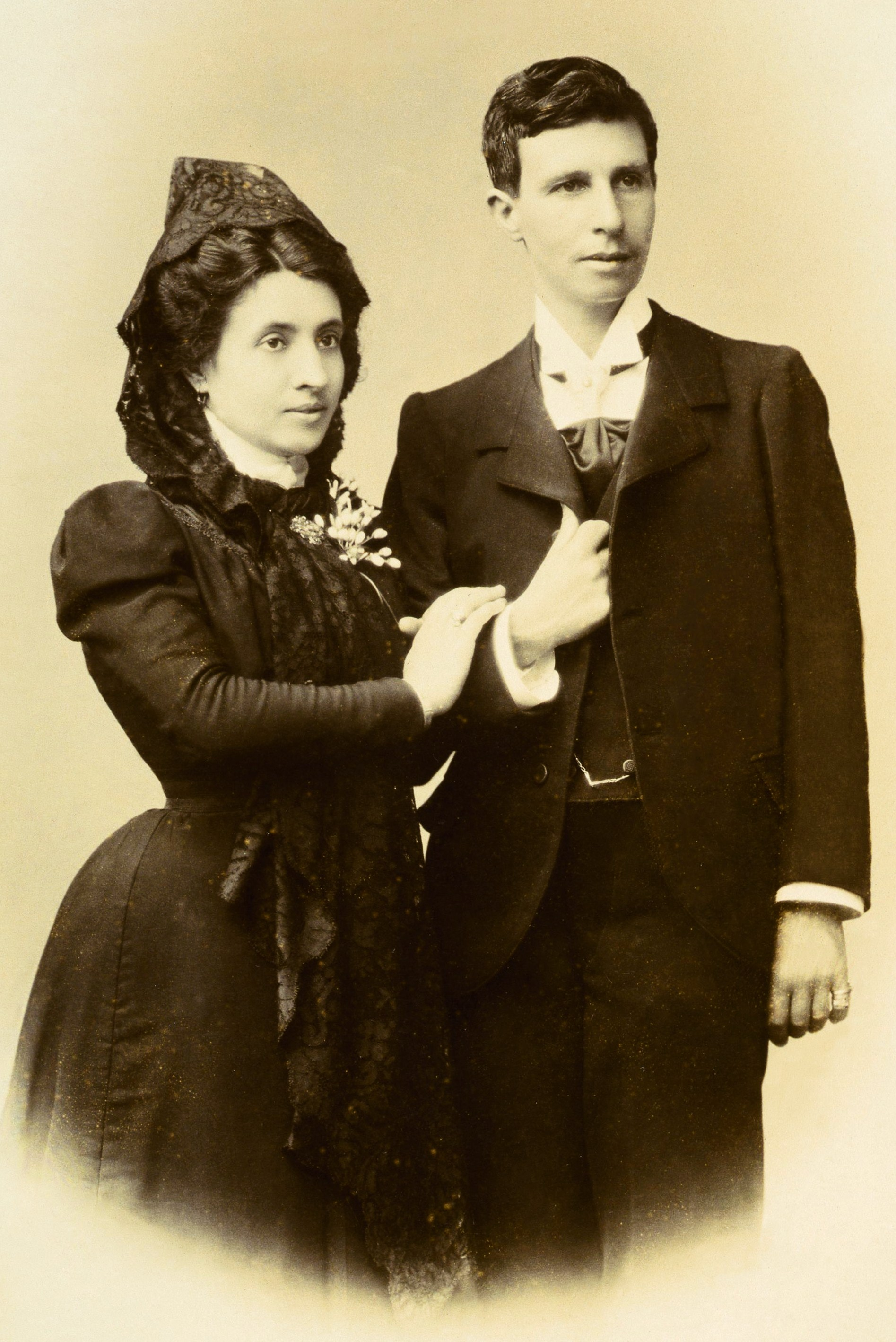 Marcela Gracia Ibeas y Elisa Sánchez Loriga, maestras de escuela. Se casaron el 8 de junio de 1901 en La Coruña. Para engañar al cura Elisa se hizo pasar por un hombre, Mario. Al ser descubiertas tuvieron que huir de España.